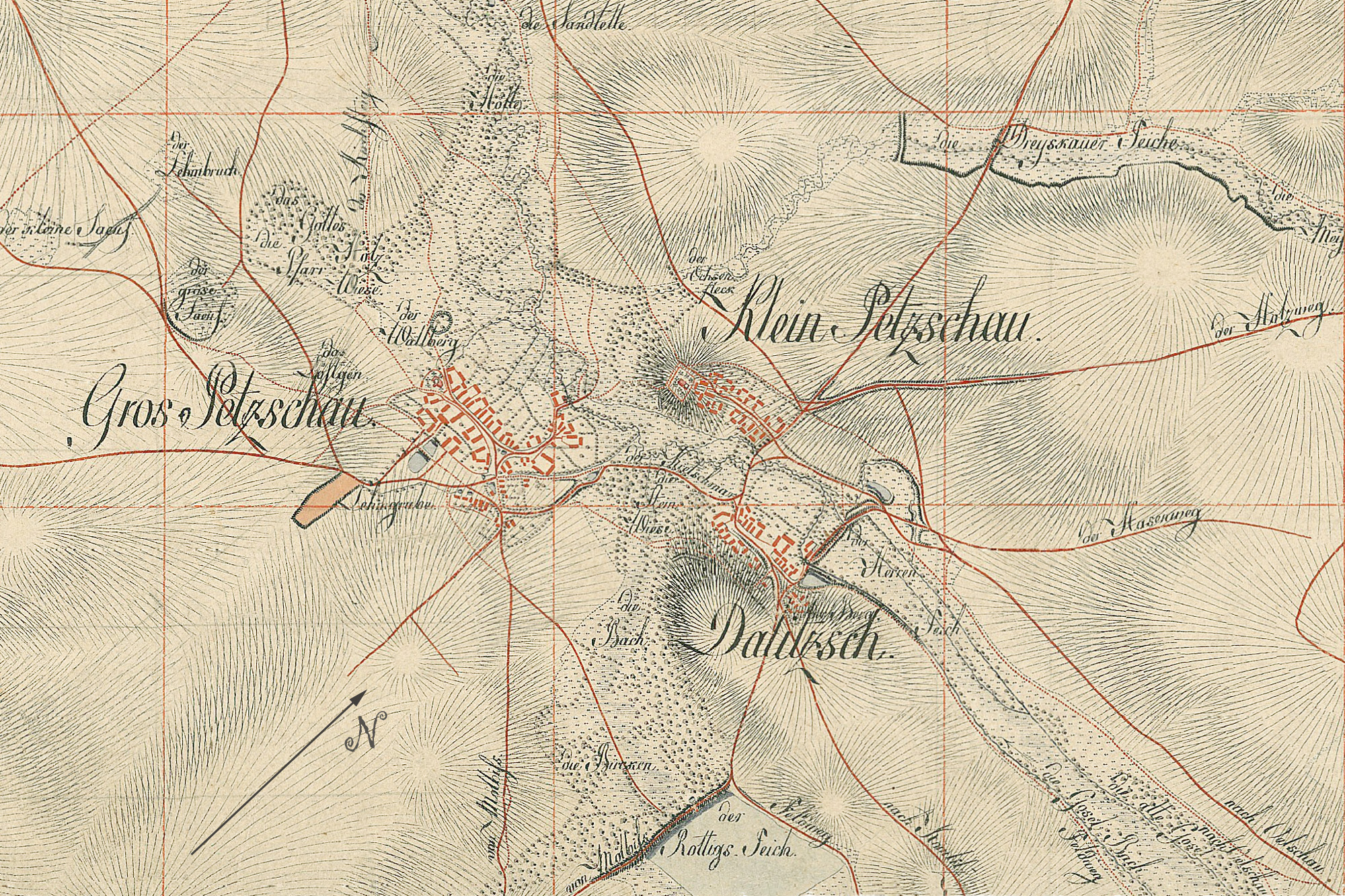 Karte von Pötzschau um 1800 (Ausschnitt aus Meilenblätter von Sachsen 1780-1806)